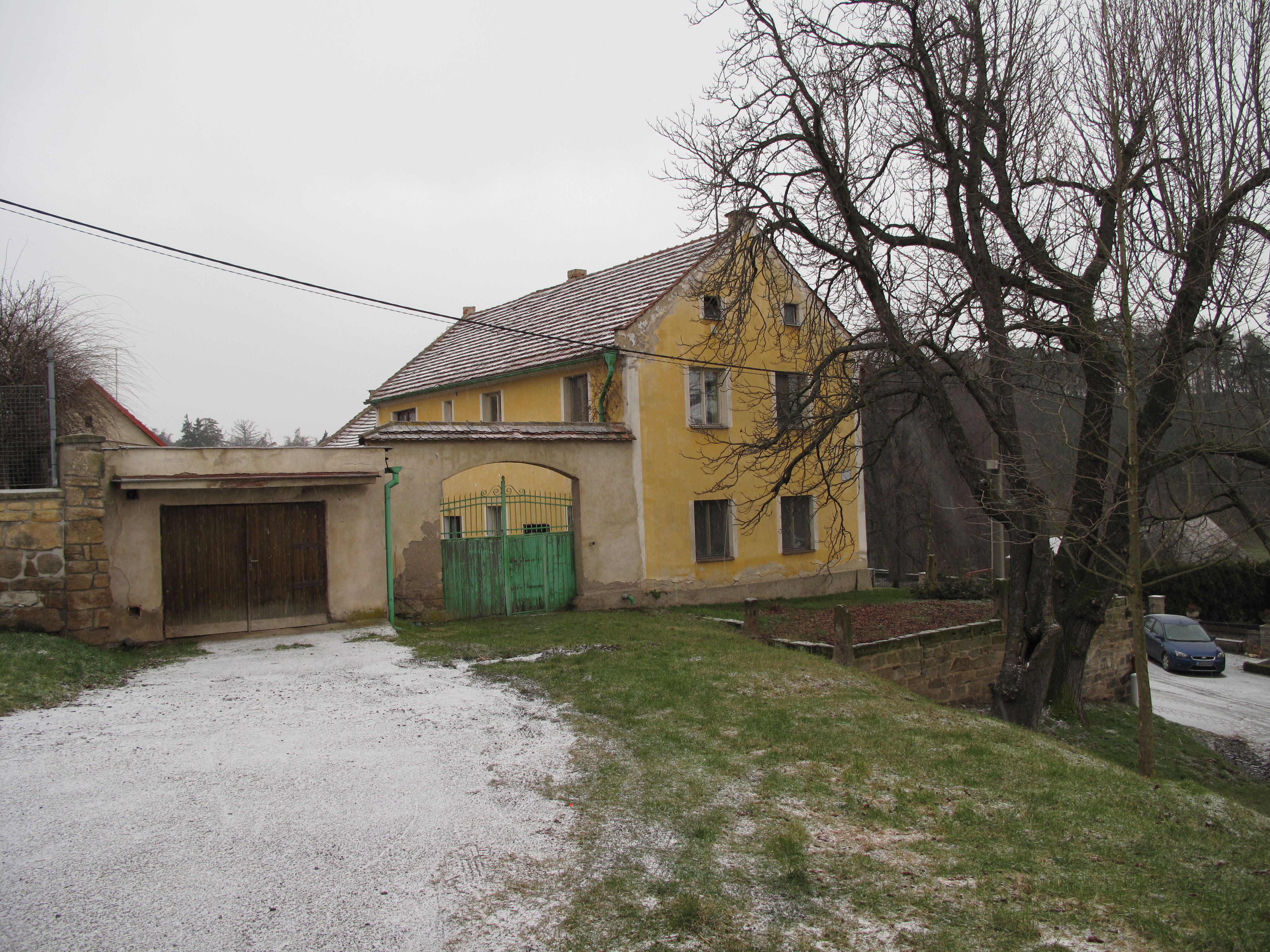 Statek v Horní Kamenici. Okres Kladno, Česká republika.